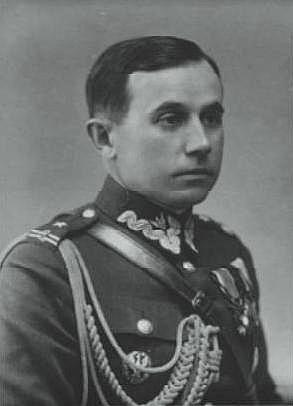 Jan Kosina